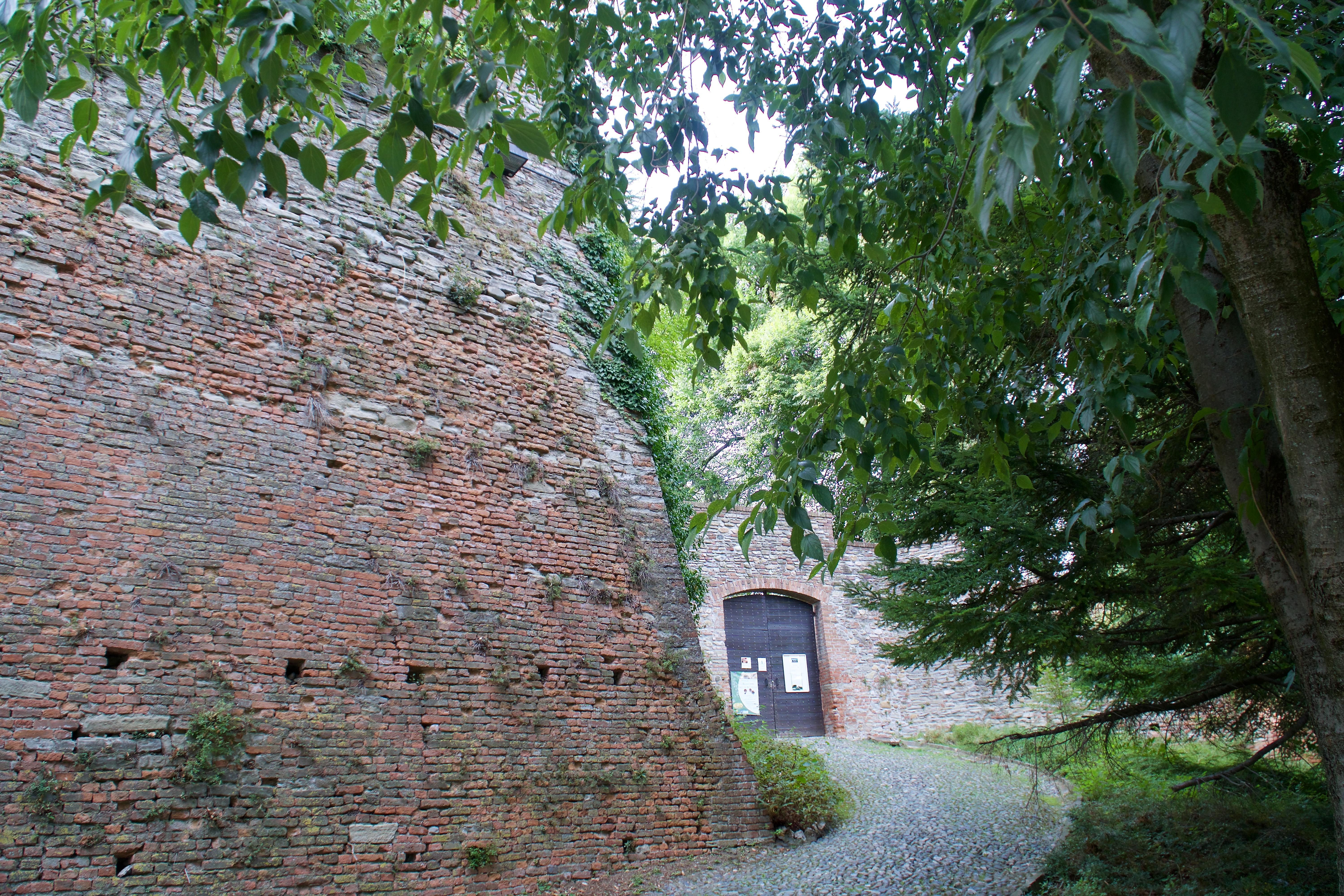 Entrata del castello dei Paleologi. This is a photo of a monument which is part of cultural heritage of Italy.